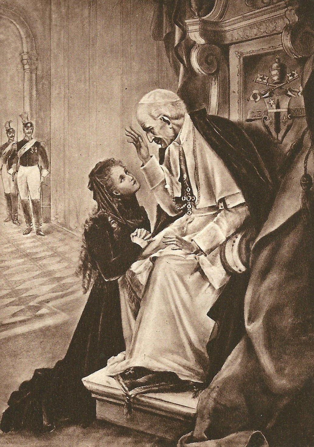 Gravure de Sainte Thérèse de l'Enfant Jésus, Histoire d'une âme écrite par elle-même, Lisieux, Office central de Lisieux (Calvados), & Bar-le-Duc, Imprimerie Saint-Paul, 1937, édition 1940. « Thérèse aux pieds de Léon XIII, reproduction d'un tableau de Céline Martin ».)